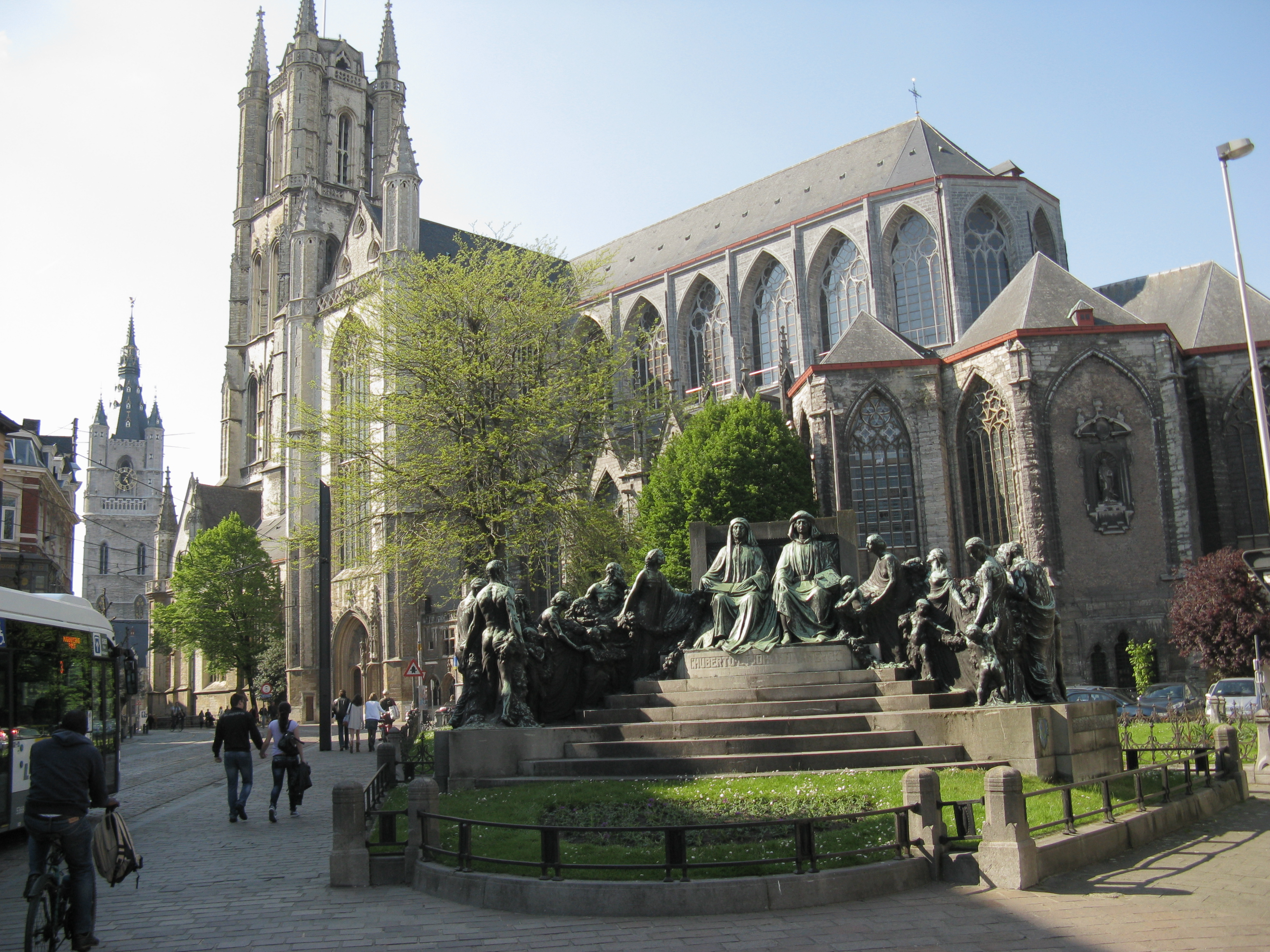 Sint-Baafskathedraal, Gent